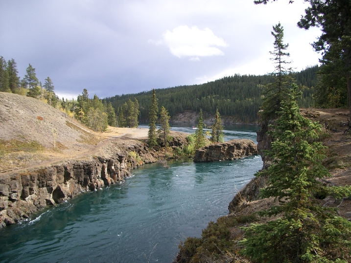 Yukon, Eingang Miles Canyon, 09/2003